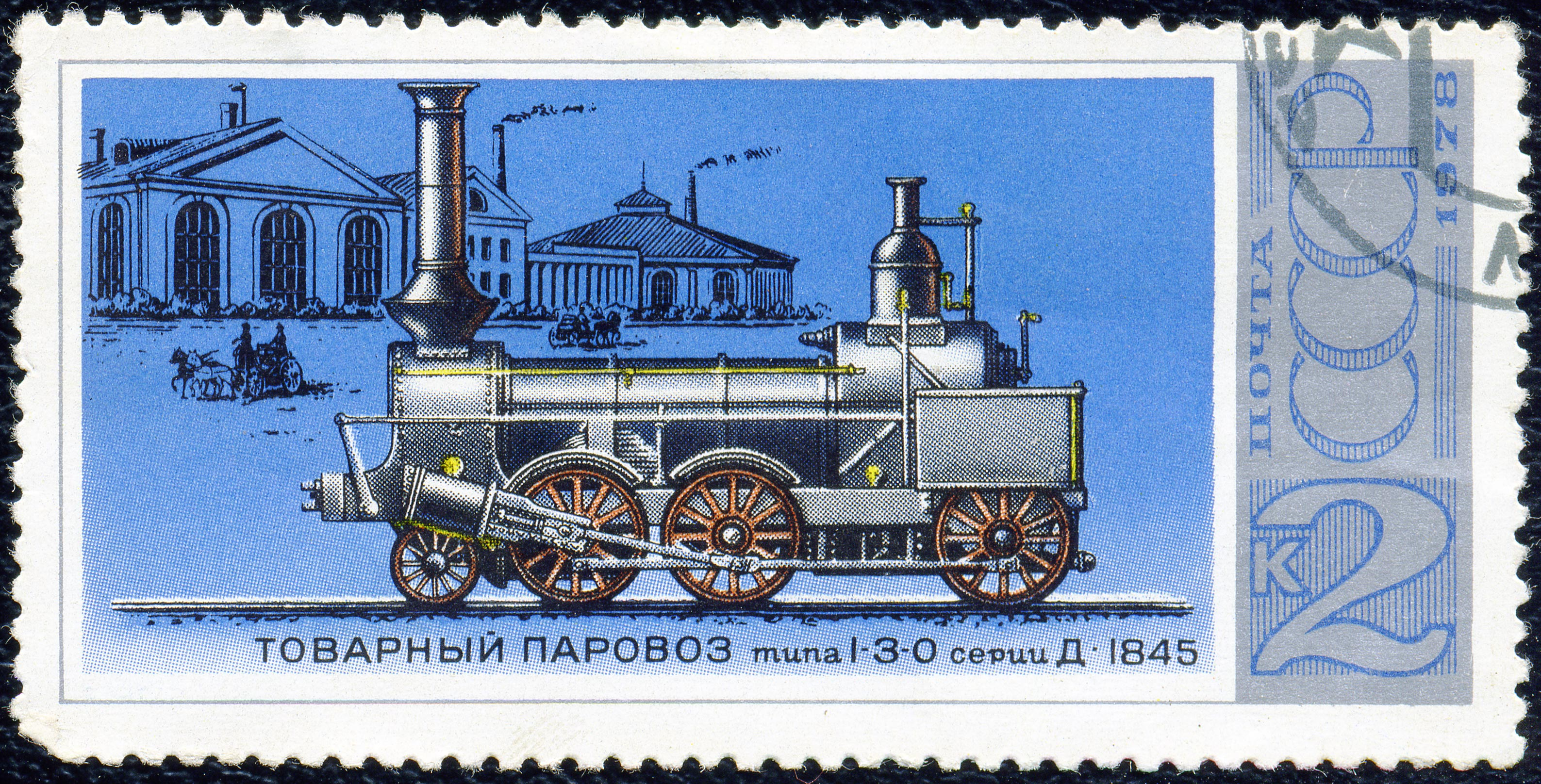 Почтовая марка СССР. 1978. Товарный паровоз типа 1-3-0 серии Д